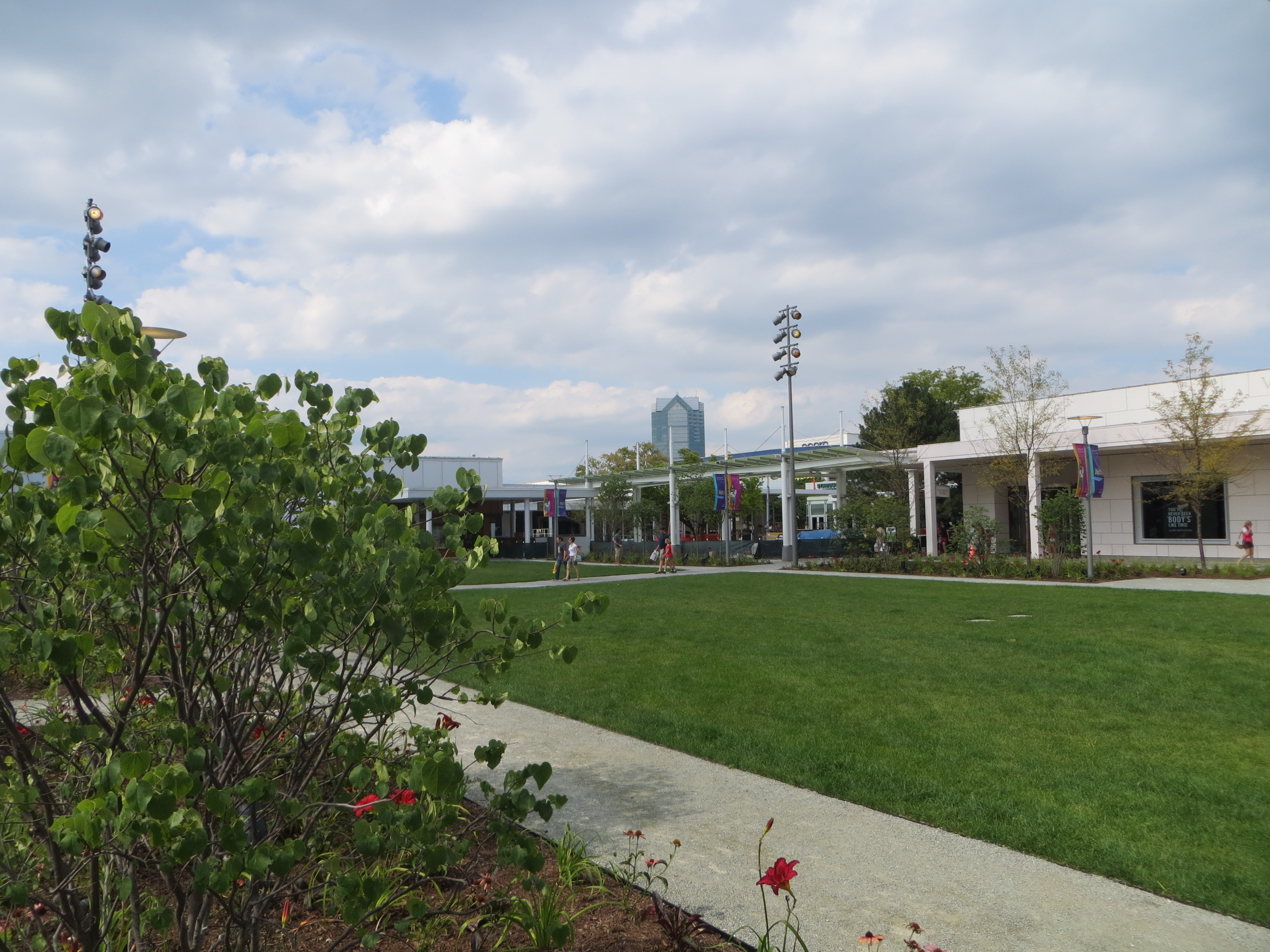 20130810 03 Oak Brook Shopping Center